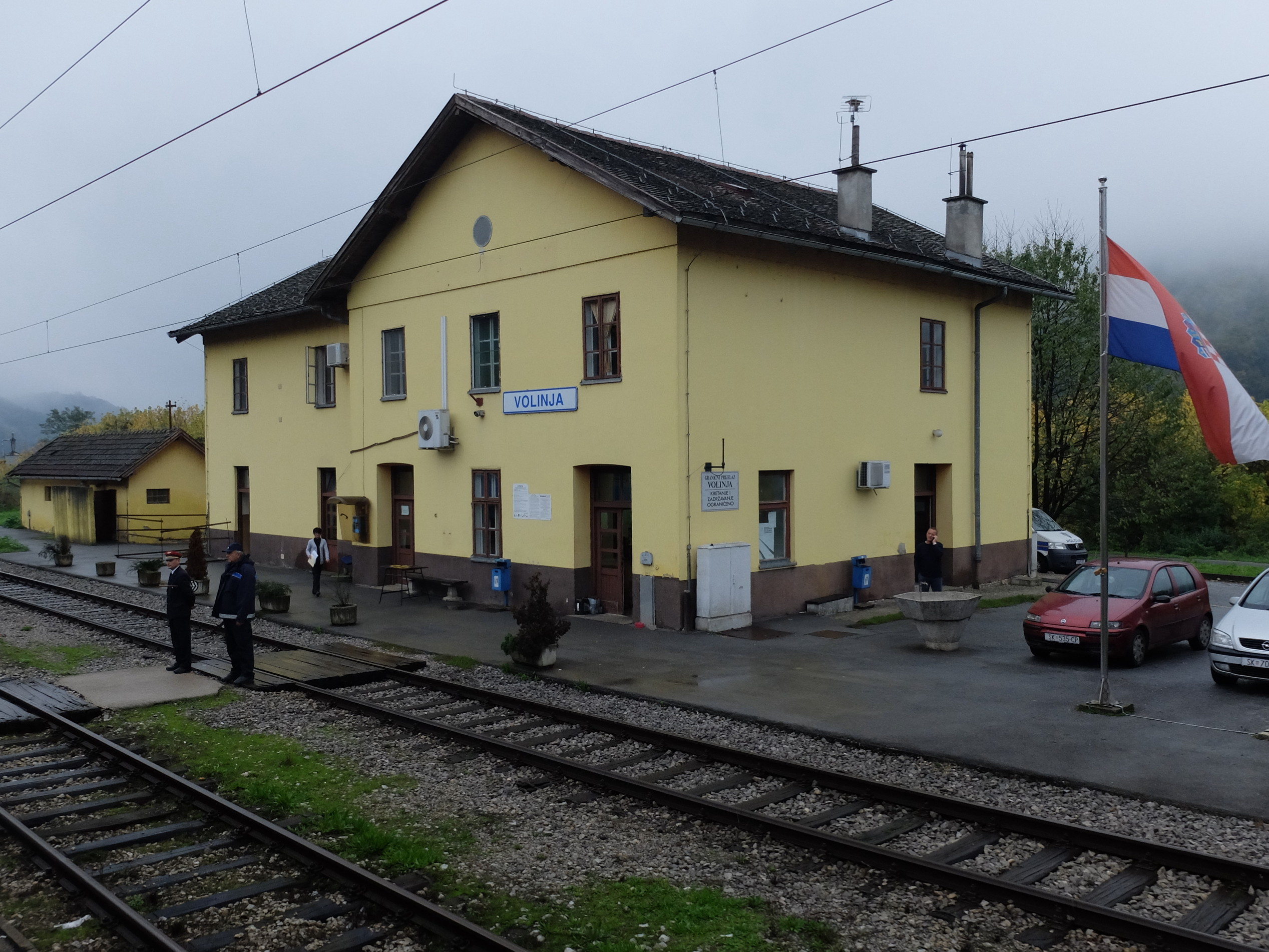 Volinja (Bahnhof)